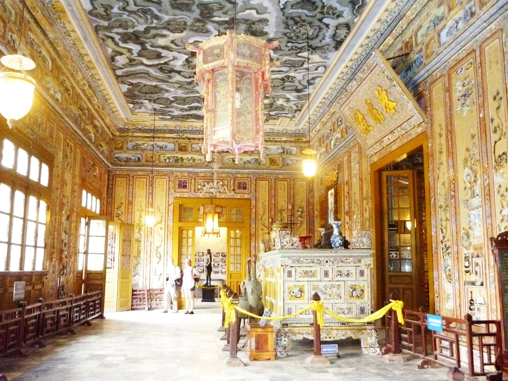 Thể Loại:Lăng tẩm Huế Thể Loại:Di tích cố đô Huế Thể loại:Lăng tẩm các Vua chúa Nguyễn Thể loại:Di tích ngoài Kinh Thành Huế